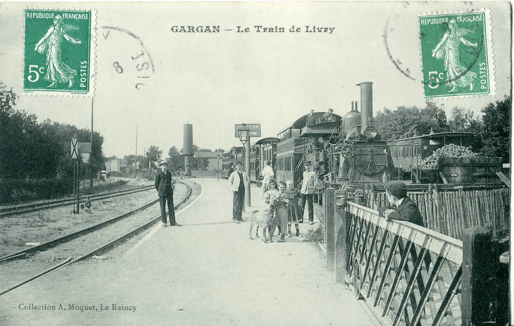 Carte postale ancienne éditée par Moquet GARGAN - le Tramway de Livry A gauche, la voie unique reliant Bondy à Aulnay-sous-bois et son évitement, à droite, le tramway de Livry, son parc à charbon et une voie de garage